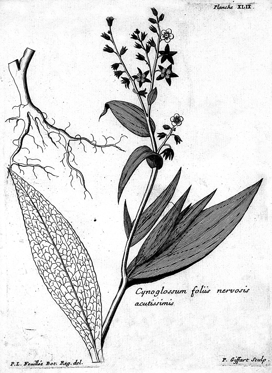 "Cynoglossum foliis nervosis acutissimis". In: "Journal des Observations Physiques, Mathematiques et Botaniques, faites par l'ordre du roy sur les côtes orientales de l'Amérique méridionale et dans les Indes occidentals depuis l'année 1707 jusques en 1712." by Louis Feuillee, (1660-1732).